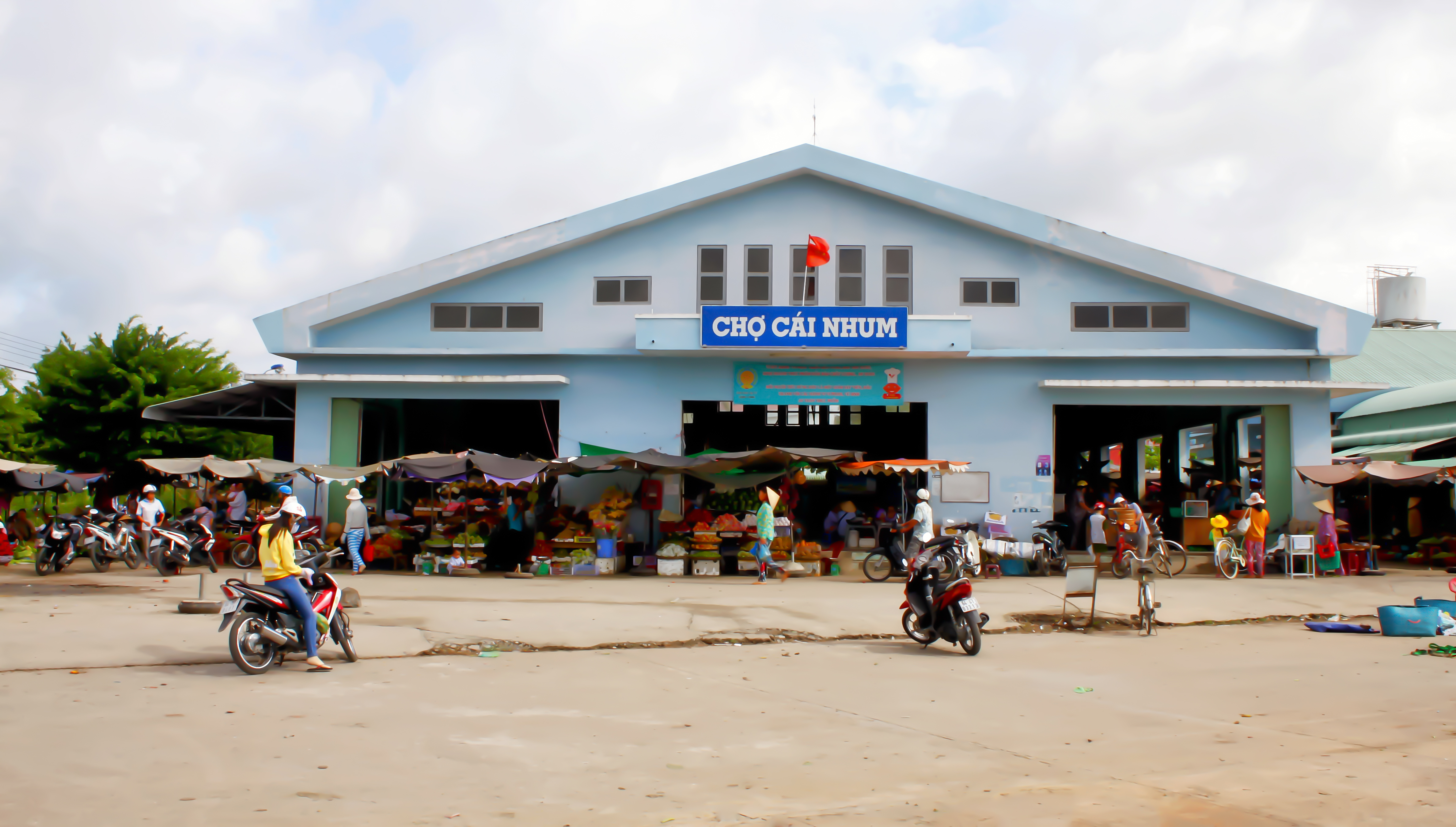 Chợ Cái Nhum (mới) bên bờ sông Mang Thít; thuộc thị trấn Cái Nhum, huyện Mang Thít, tỉnh Vĩnh Long, Việt Nam.